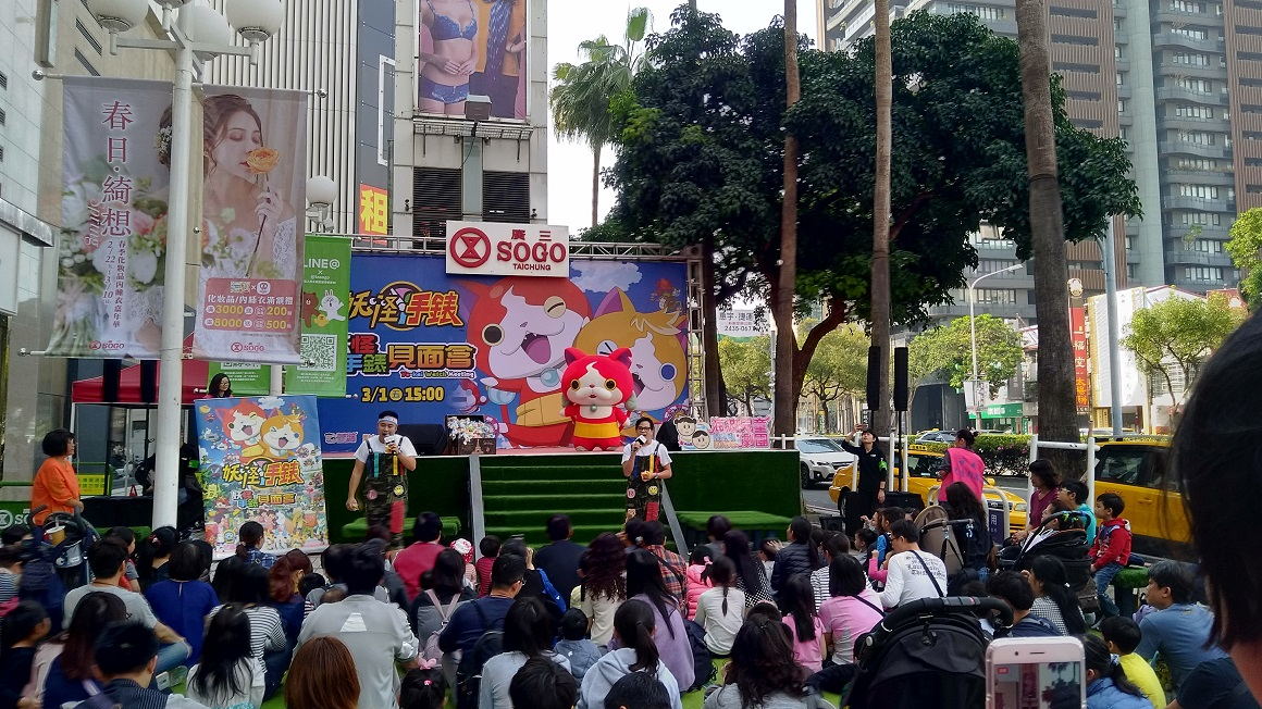 在廣三崇光百貨妖怪手錶見面會中登場，由布偶演員飾演的吉胖喵，攝於2019年3月1日。